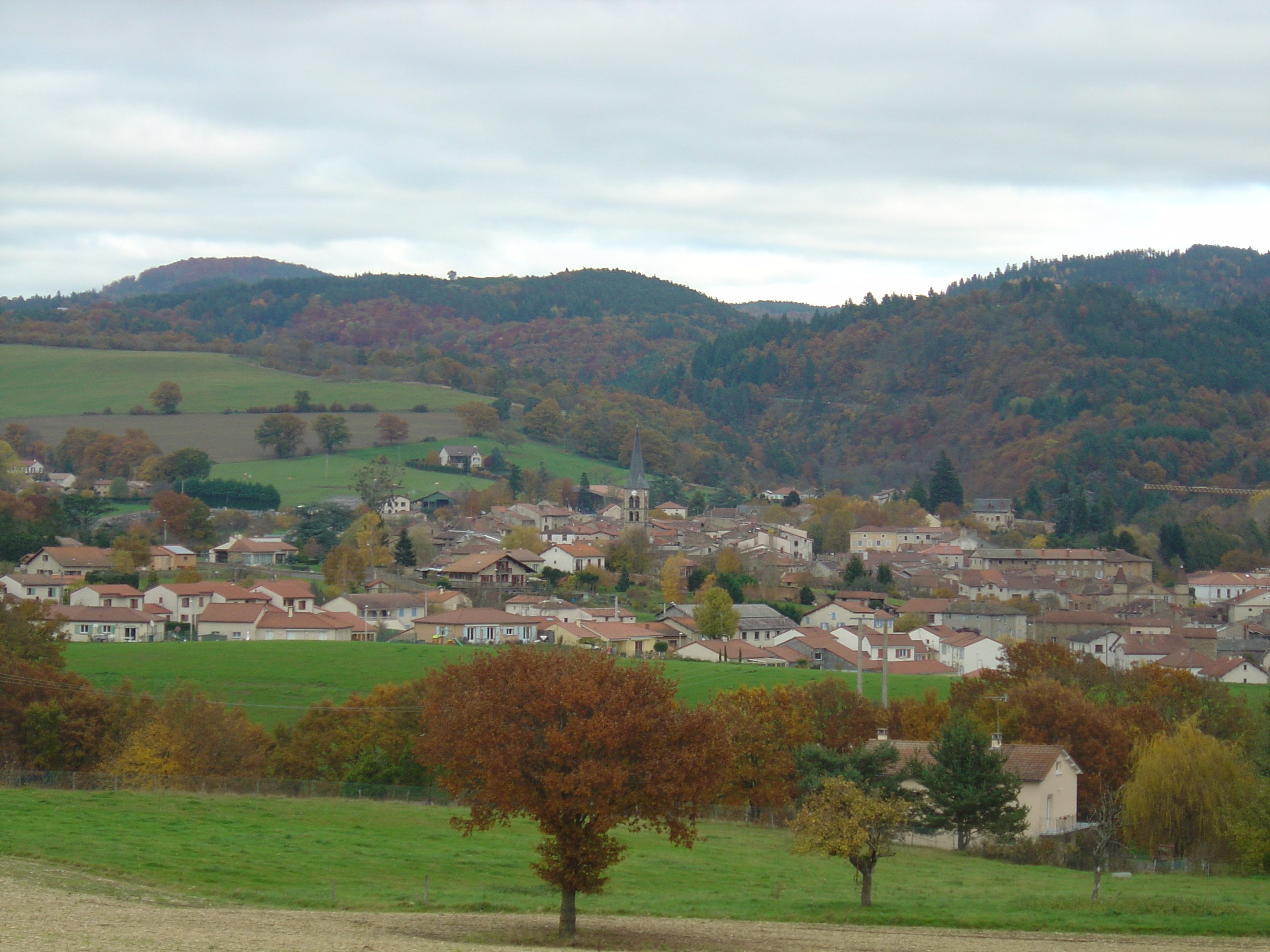 Vue générale de Sauxillanges (63-Puy de Dôme; Livradois)